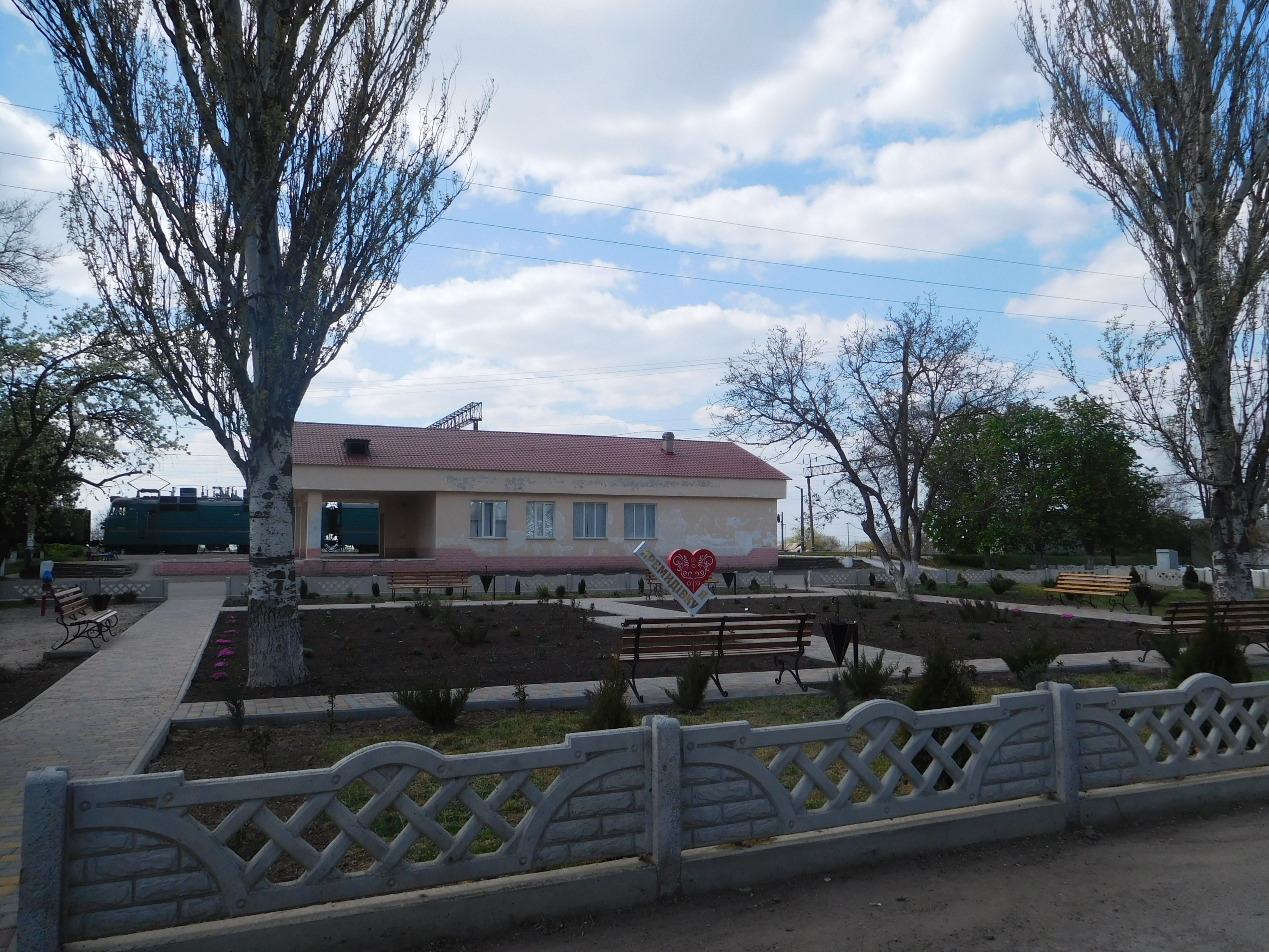 с. Кремидівка, Лиманський район, Одеська область